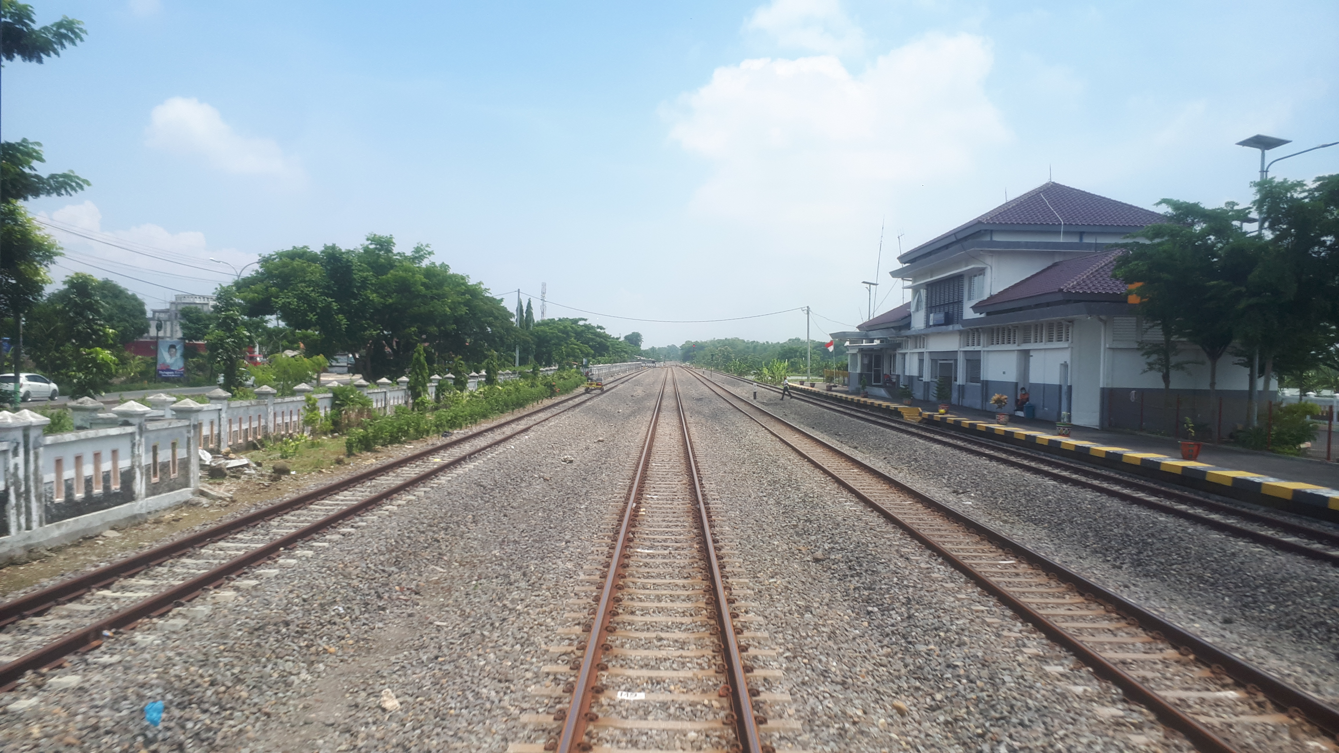 Emplasemen Stasiun Surabayan yang terletak di Kabupaten Lamongan, 2020